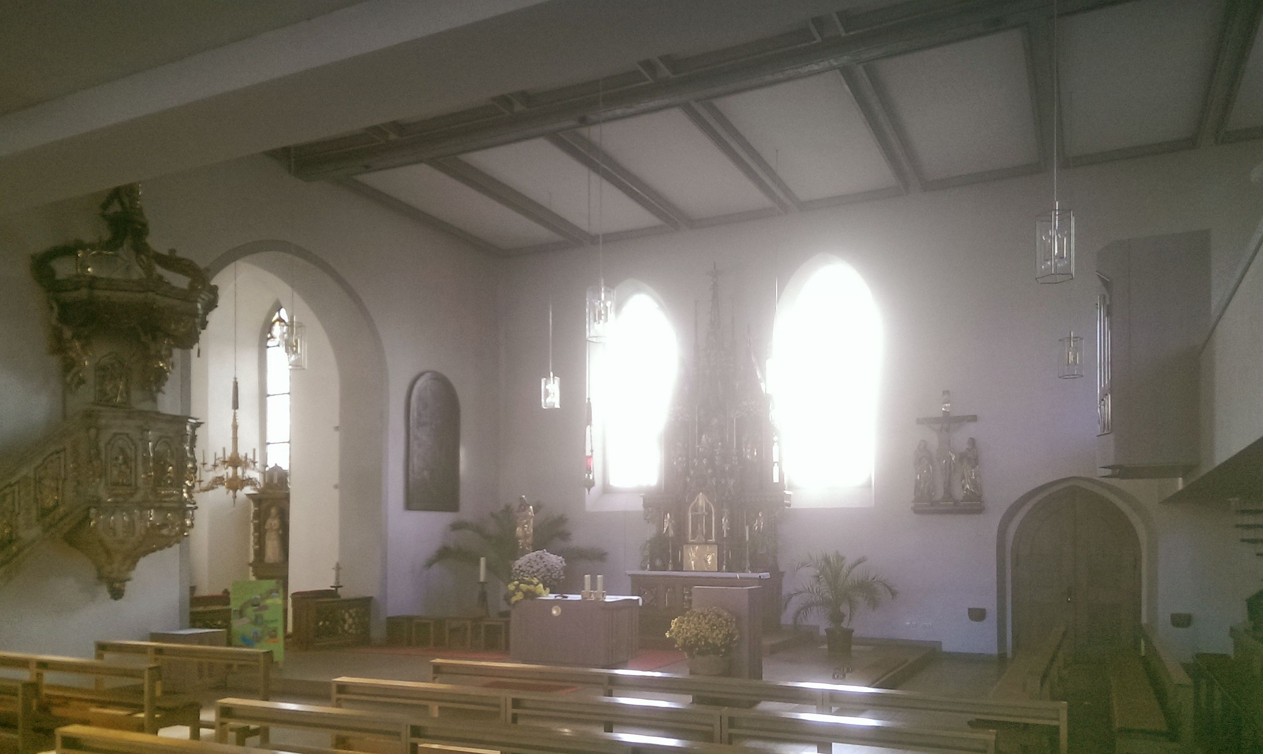 Blick vom Neubau in den Innenraum